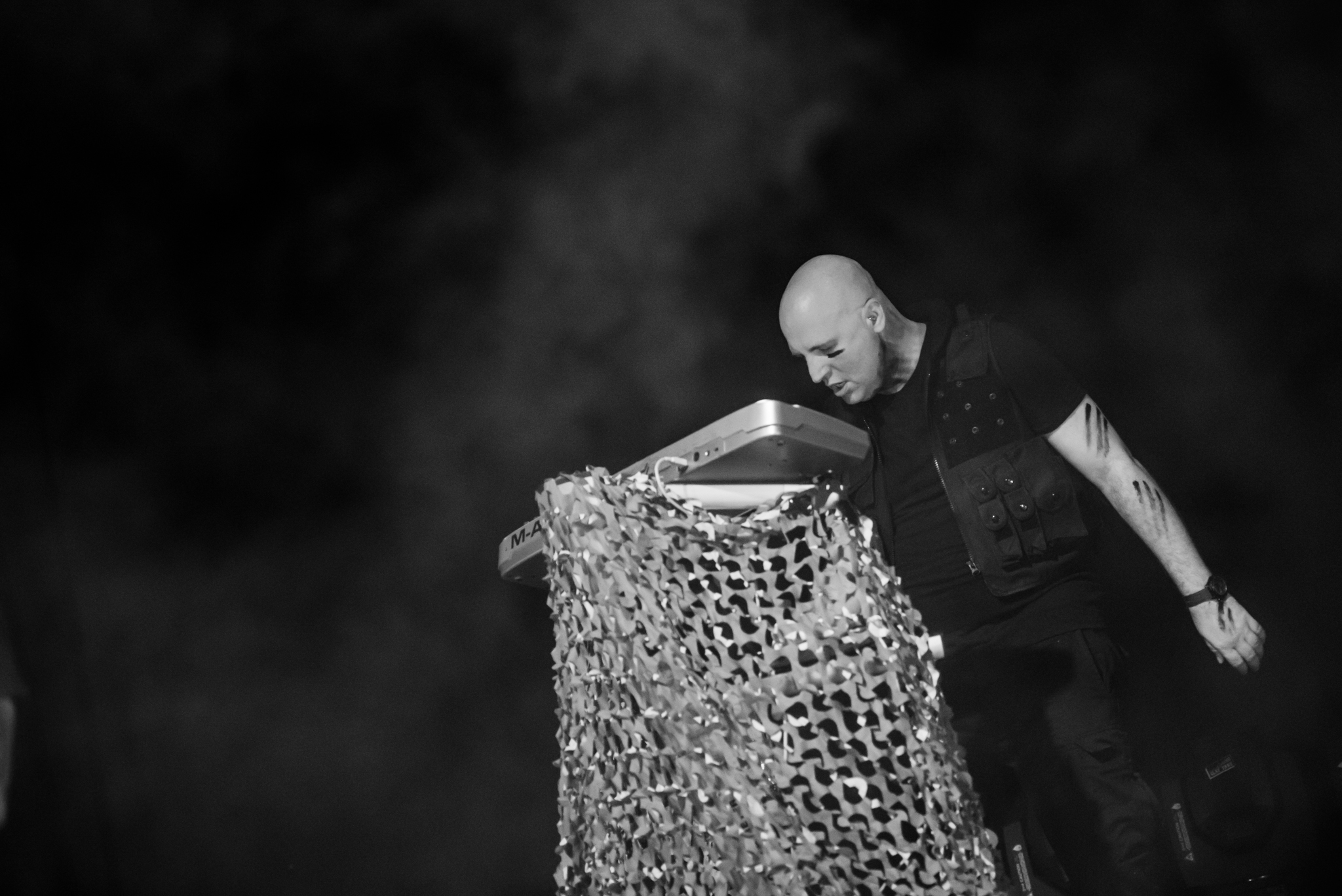 'E-Tropolis 2015; Oberhausen Turbinenhalle': 'Grendel'